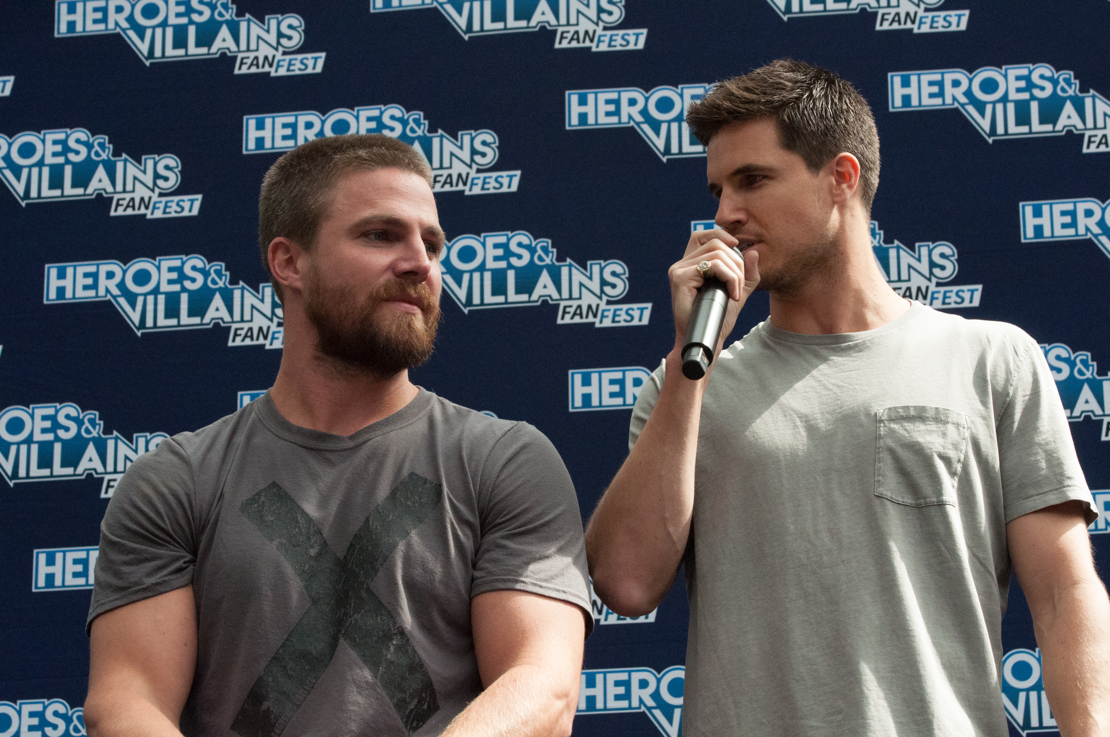 HVFFLondon2017Amell-ALS-29